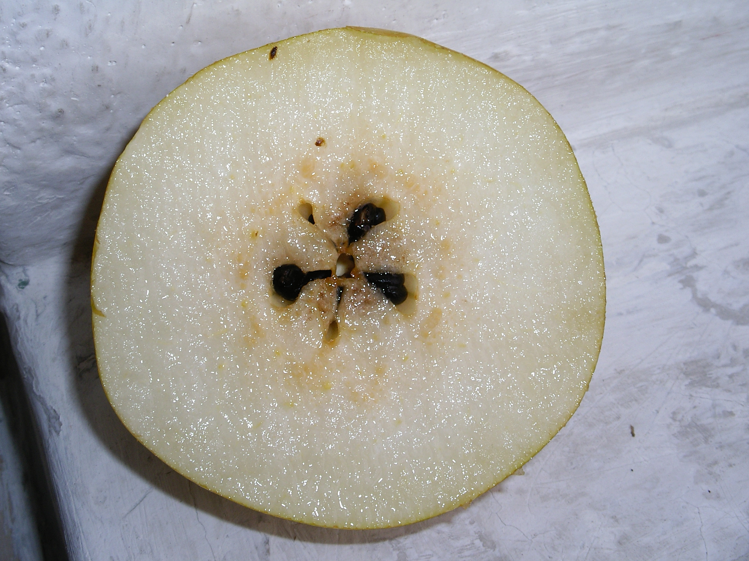 Nashi in sezione